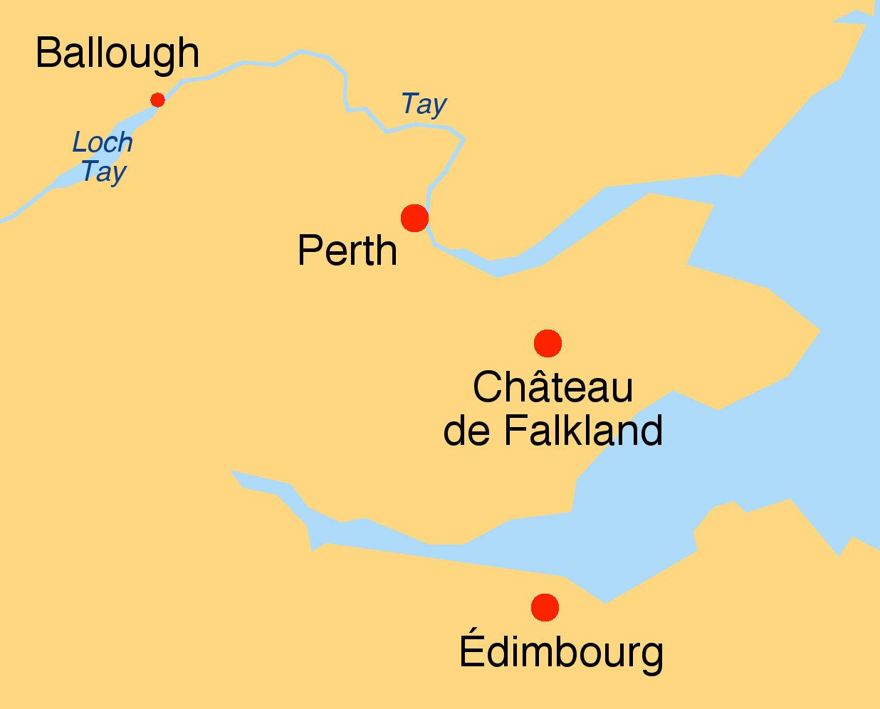 Lieux du roman de Walter Scott La Jolie Fille de Perth (The Fair Maid of Perth). Je me suis basé, en schématisant beaucoup, sans grand souci d'exactitude, sur la carte Scottish Highlands and Lowlands.png de Jrockley.